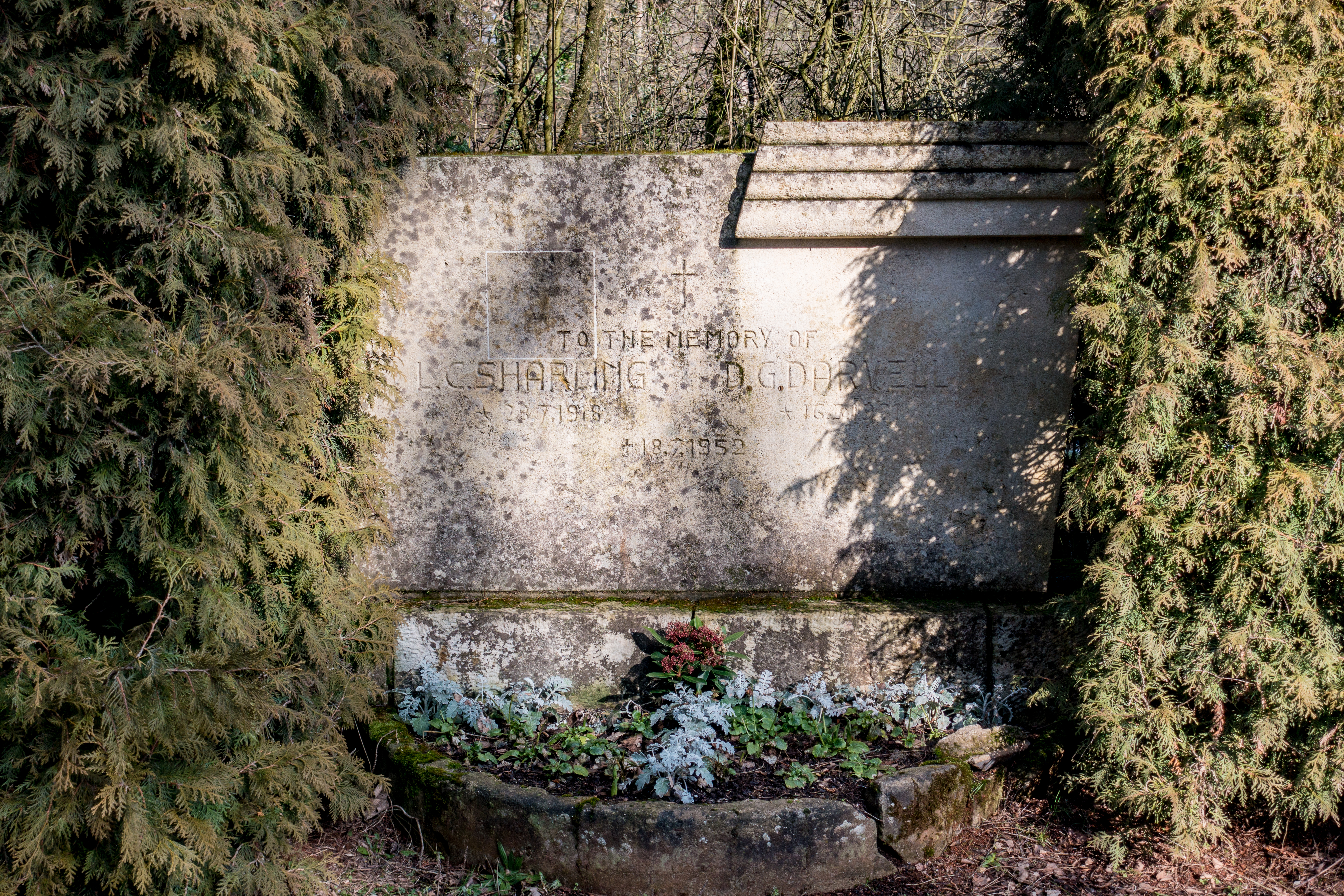 D'Monument steet um Flouer Roschheck (Keel), lénks un der N33, Richtung Rëmeleng, ronn ee Kilometer no der Kräizung Keeler Poteau. Et erënnert un d'Fligeraccident vum 18. Juli 1952 bei deem de Pilot L.C. Sharling a säin eenzege Passagéier, de Fotograf D.G. Darvell ëm d'Liewe koumen. D'Denkmal gouf den 30. Juni 1957 ageweit. Den Avion vun der englescher Hunting Aerosurveys Ltd, een als AS.40 Oxford ëmgebaute Krichsfliger Airspeed AS.10, mat der Immatrikulatioun G-AIRZ (ex HN610) war fir Loftopnamen um Wee vun Elstree (bei London) no Klagenfurt mat engem programméierten Zwëschestopp zu Stroossbuerg. D'Gefier wier "wéi e Stee vum Himmel gefall", de Pilot an de Fotograf ware béid dout op der Plaz. D'Grënn vum Accident goufen net geklärt, de Fliger gouf verschrott. Krakaul, den Uert vum Accident läit am Bësch eng 700 Meter südwestlech vum Monument.